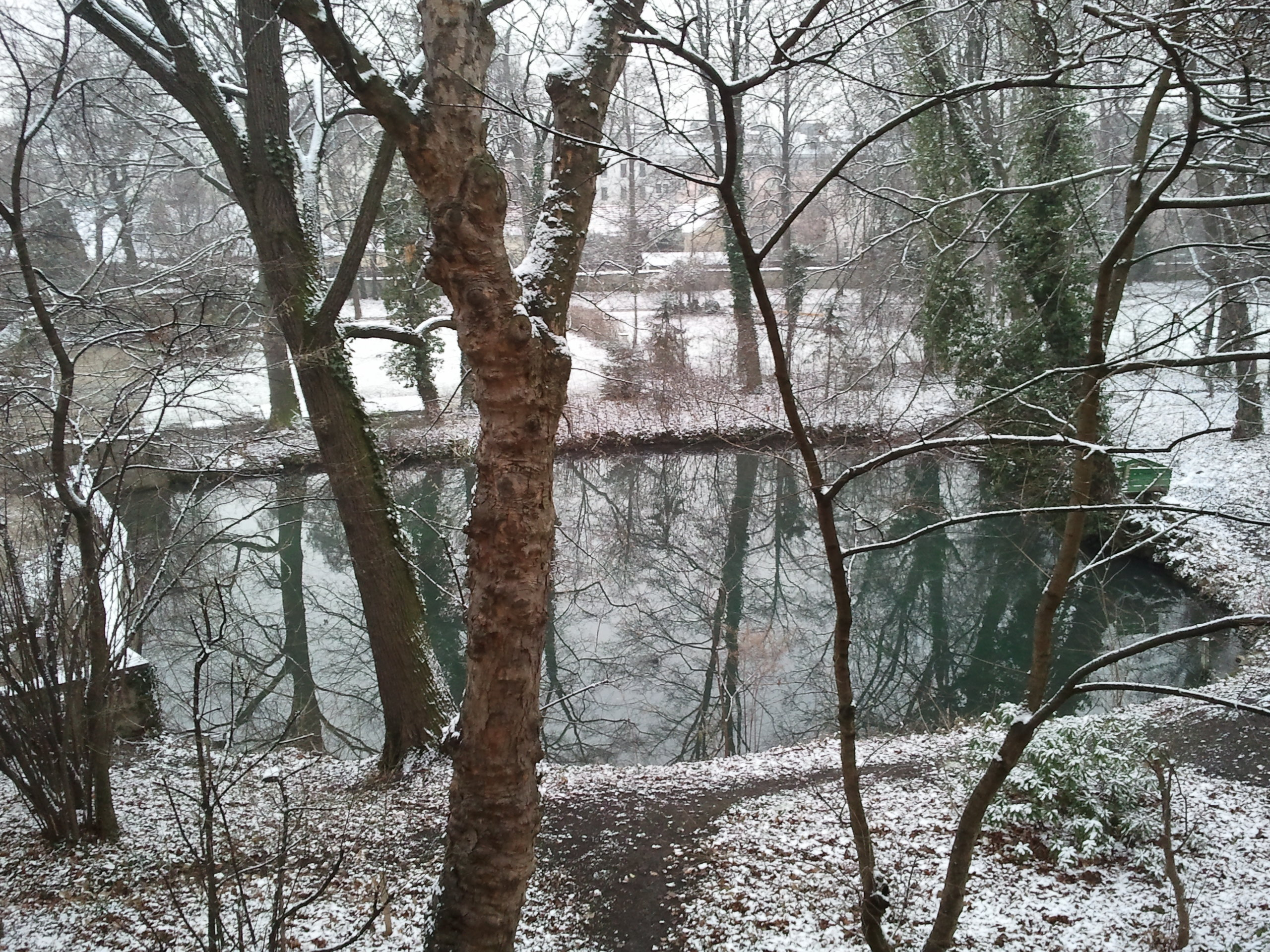 Park des Schlosses Altmannsdorf (Wien)